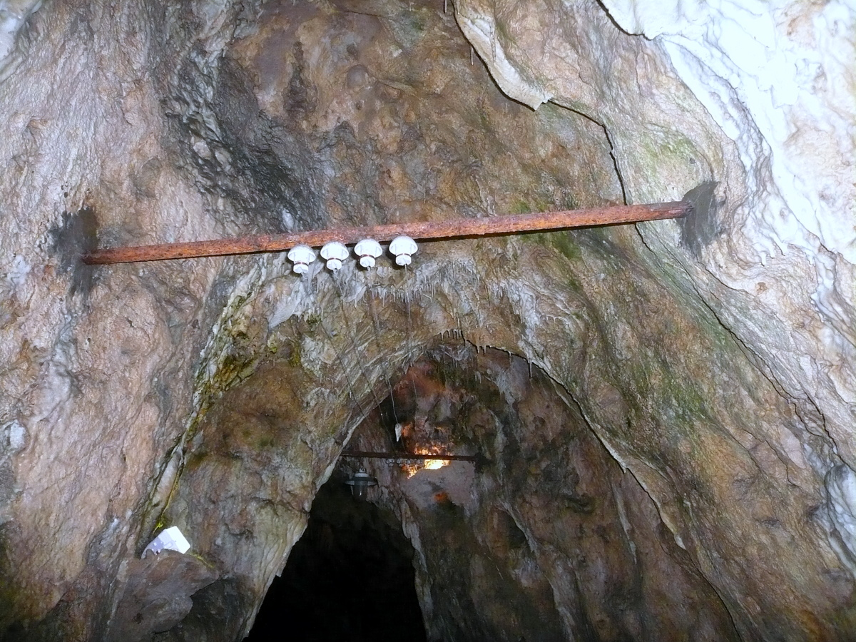 Charlottenhöhle